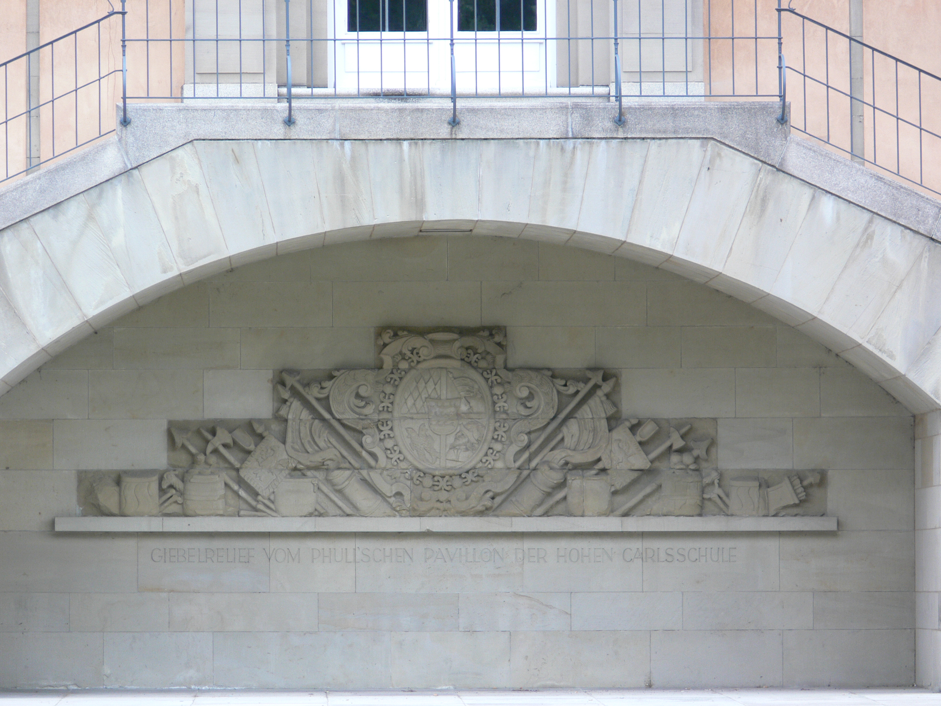 Neues Schloss, Stuttgart Ehemaliges Giebelrelief der Hohen Carlsschule, heute an der Rückseite des Neuen Schlosses in Stuttgart angebracht